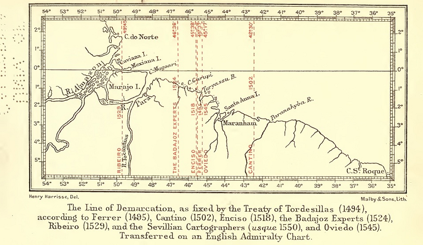 La ligne de démarcation entre les territoires espagnols et portugais dans le Nouveau monde selon le Traité de Tordesillas de 1494. Lecture de Ferrer (1495), Cantino (1502), Enciso (1518), The Badajoz Experts (1524), Ribeiro (1529), Oviedo (1545), les cartographes sévillans jusque vers 1550. Cartographié pour une charte de l'Amirauté anglaise. Bibliographie : Henry Harisse, The diplomatic history of America : its first chapter 1452-1493-1494 (1897). Autre fichier : .